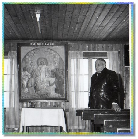 Jonas A. Jonsson i sin egen "Grängsbo Lillkyrka" 1969